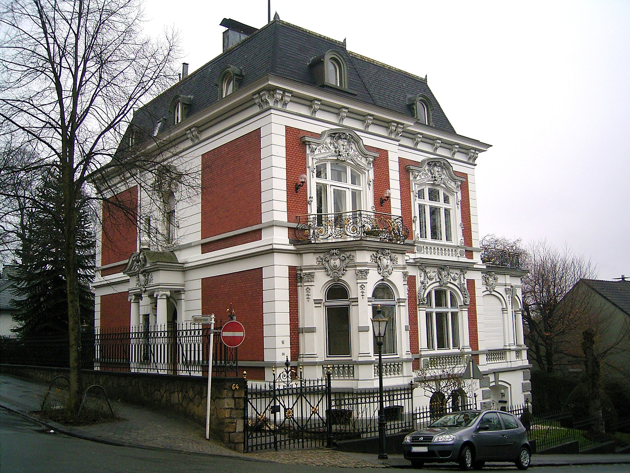 Wuppertal Briller Viertel Sadowstraße 64